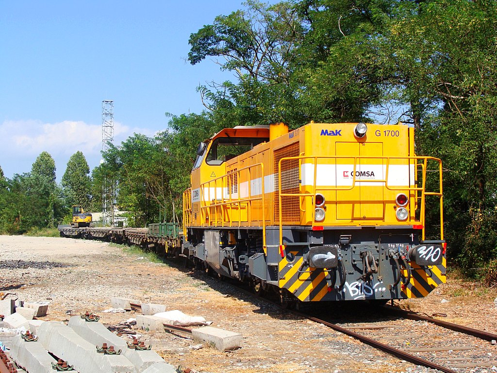 La locomotora serie 317 de COMSA en la estación de Caldes de Malavella.